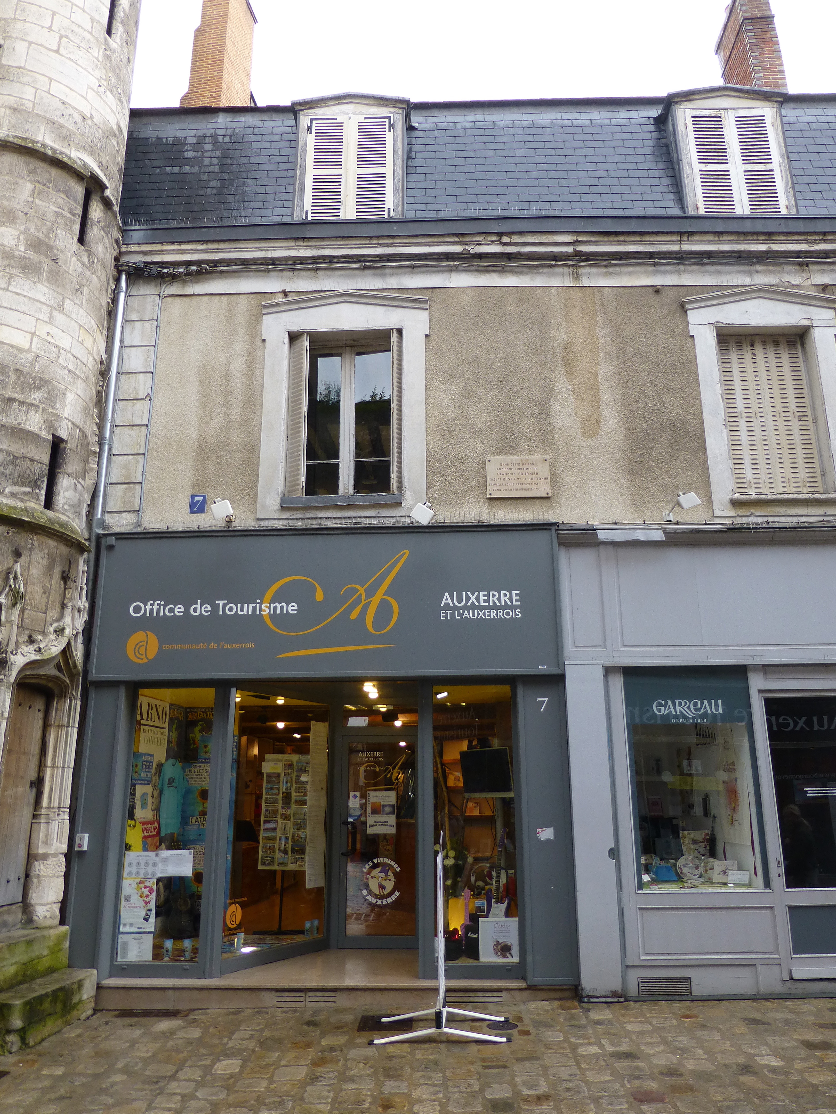 Auxerre (Yonne) : dans cette maison, ancienne librairie de François Fournier, Nicolas Restif de la Bretonne travailla comme apprenti (1751-1755) puis comme compagnon imprimeur (1759-1761)